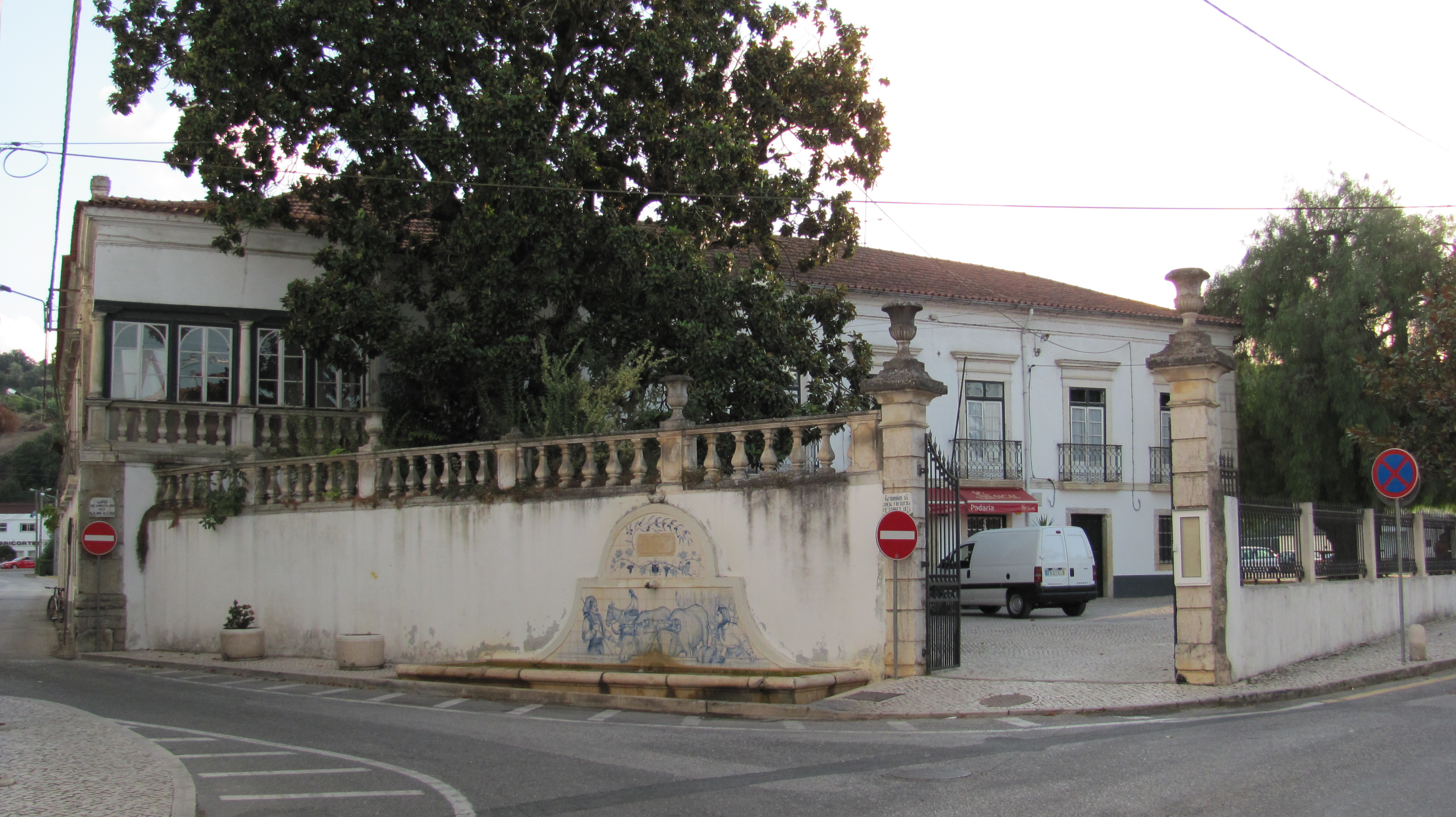 Photographie de la Quinta da Cerca, réalisée par l'architecte portugais d'origine suisse Ernesto Korrodi.